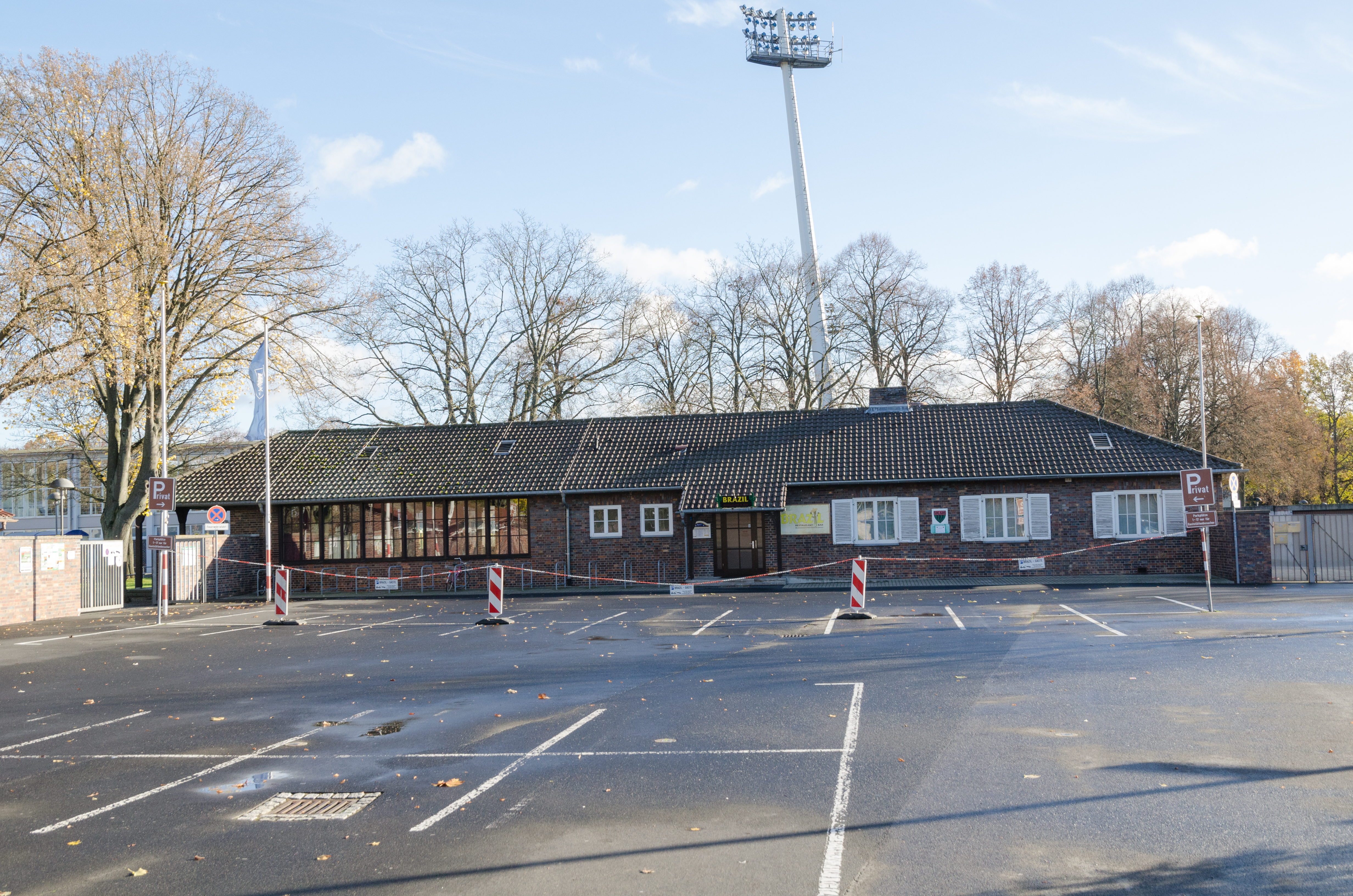 Schweinfurt, Williy-Sach-Stadion, Sportgaststätte